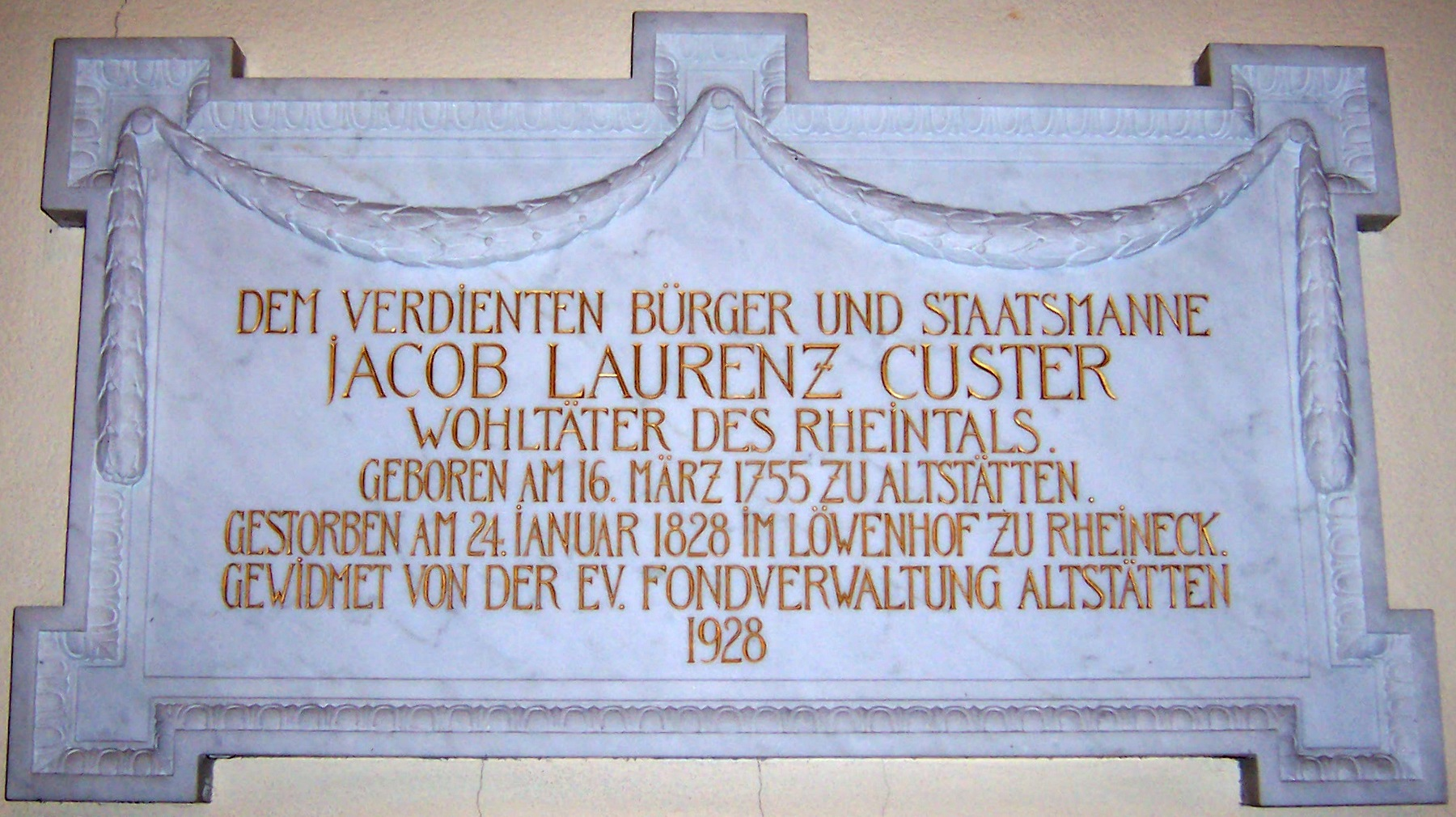 Gedenktafel von Jacob Laurenz Custer, Finanzminister der Helvetischen Republik, in der evangelischen Kirche